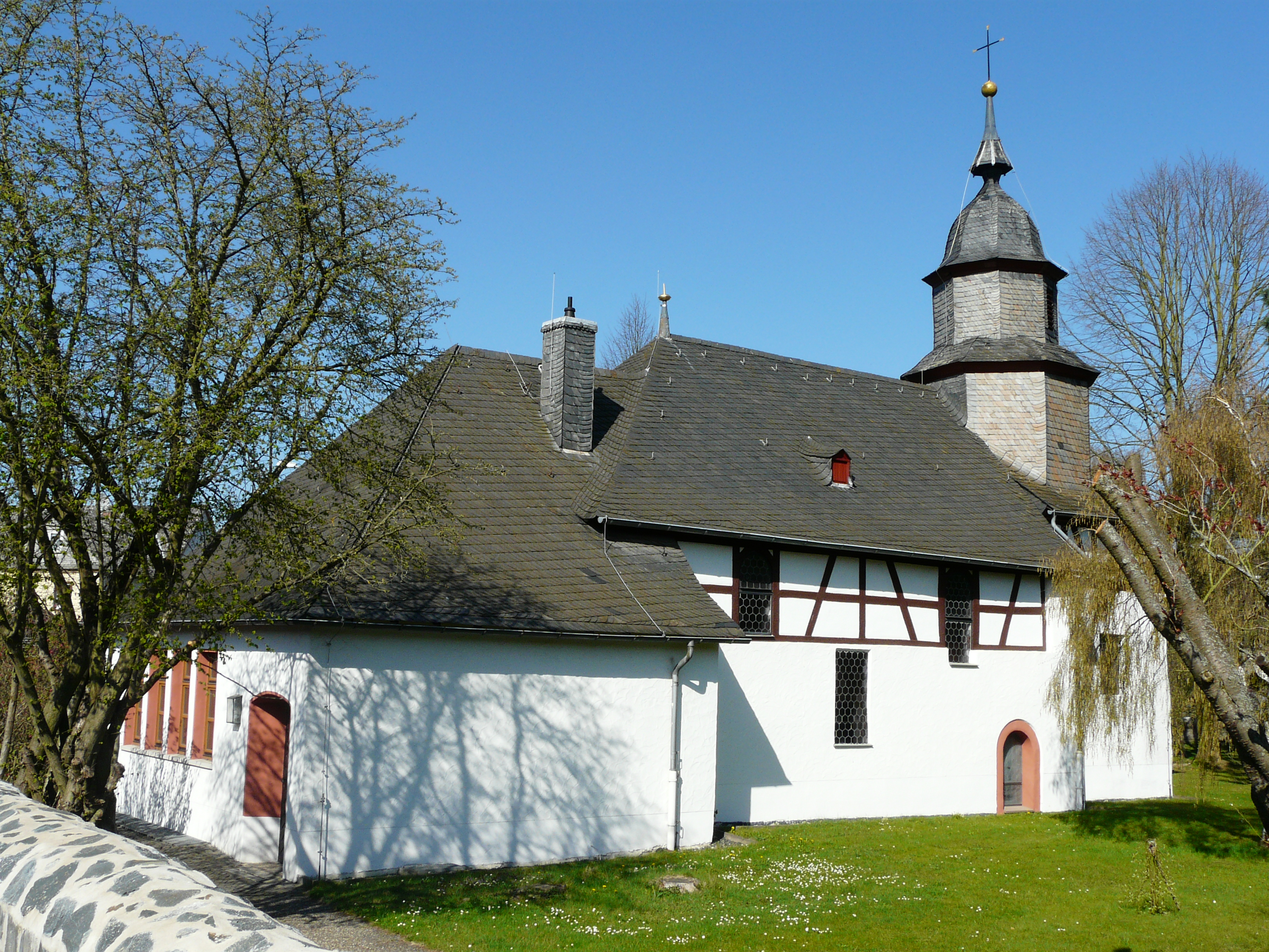 Evangelische Pfarrkirche in Solms-Oberndorf